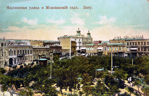 Молоканский сад.